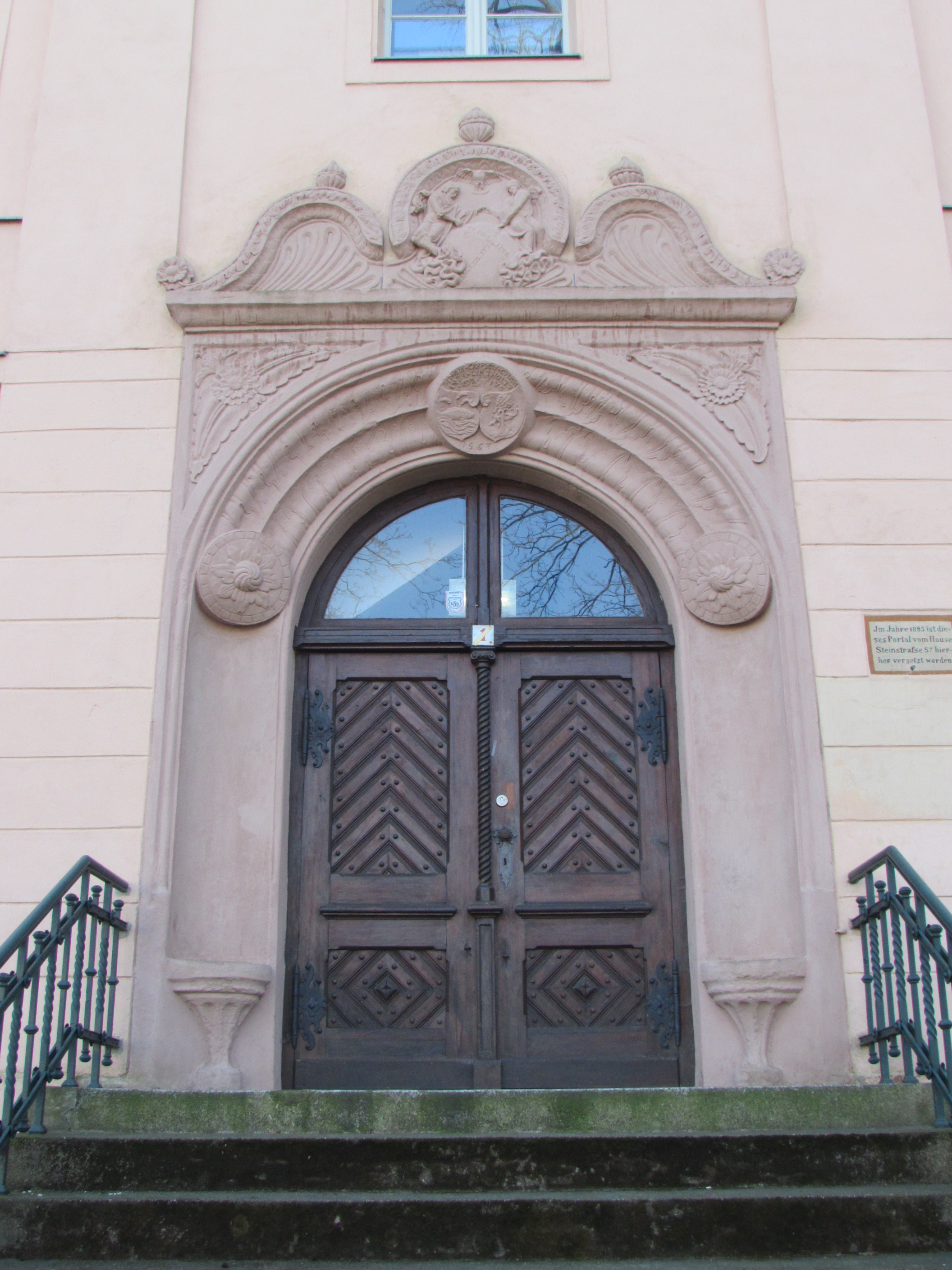 Portal der Saldria am Gotthardtkirchplatz 9, vormals Portal des Carpzowschen Hauses, Brandenburg an der Havel